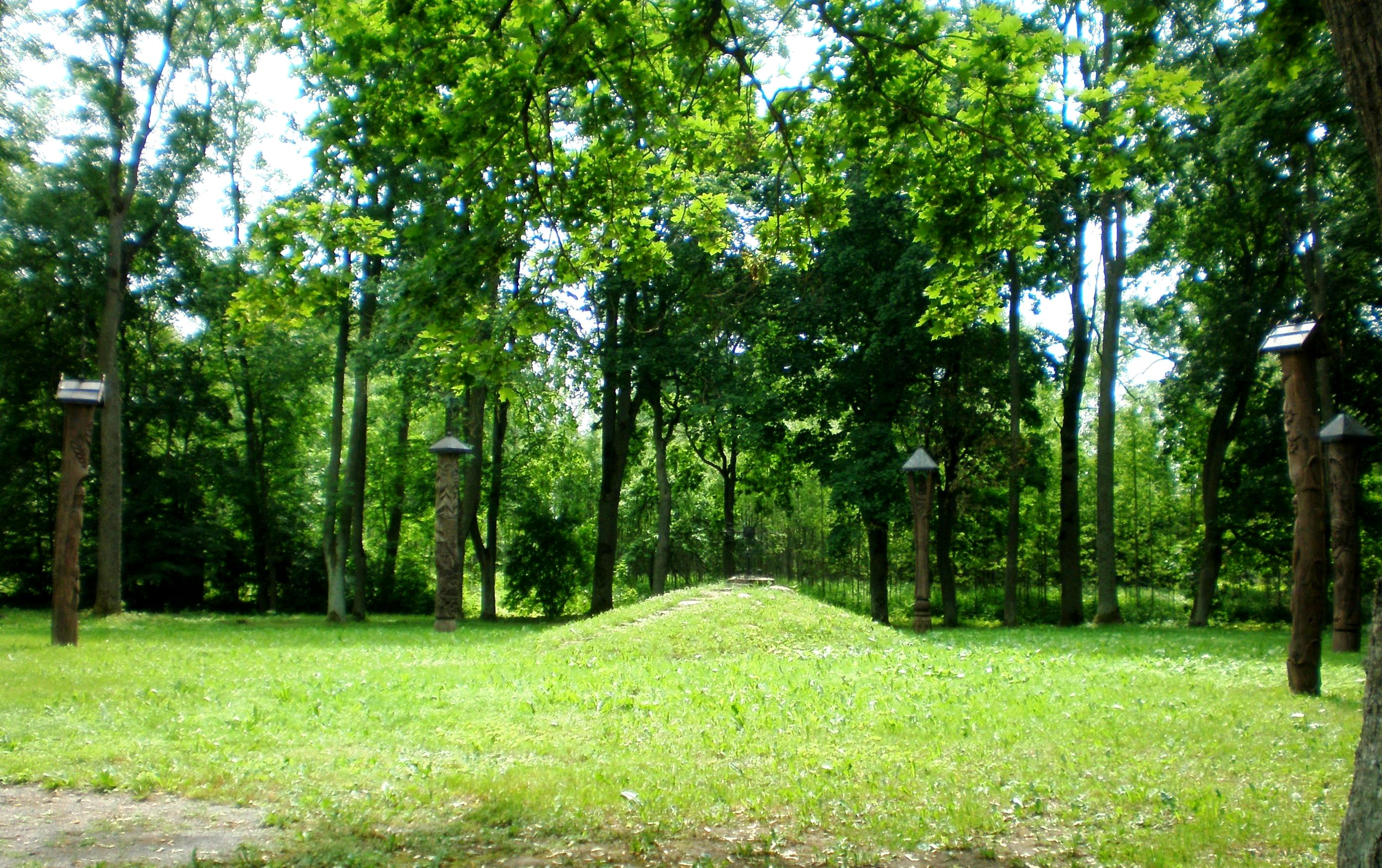 1863 m. sukilėlių kapai, Paberžė, Kėdainių raj.